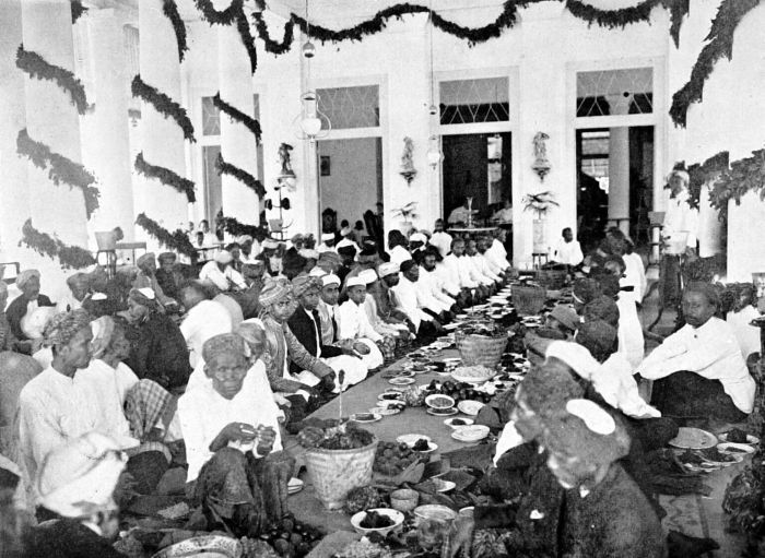 Repronegatief. Het feestmaal muludan, ter herdenking van de geboorte en het leven van de profeet Mohammed, te Serang, Java.